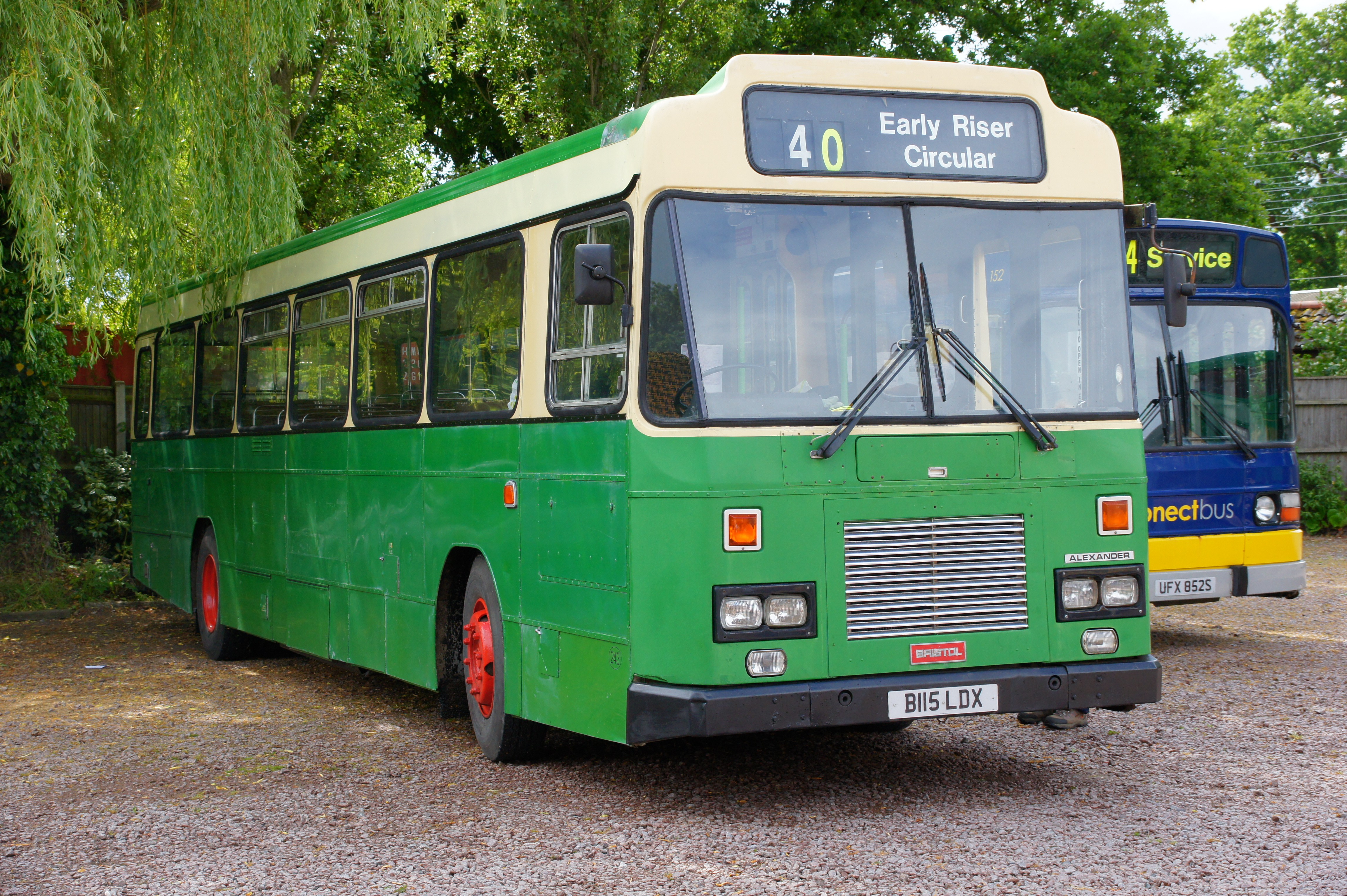 B115LDX 230613 CPS